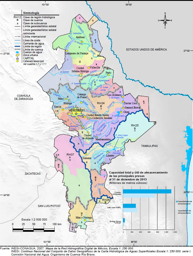 Mapa Hidrografía Estado de Nuevo León